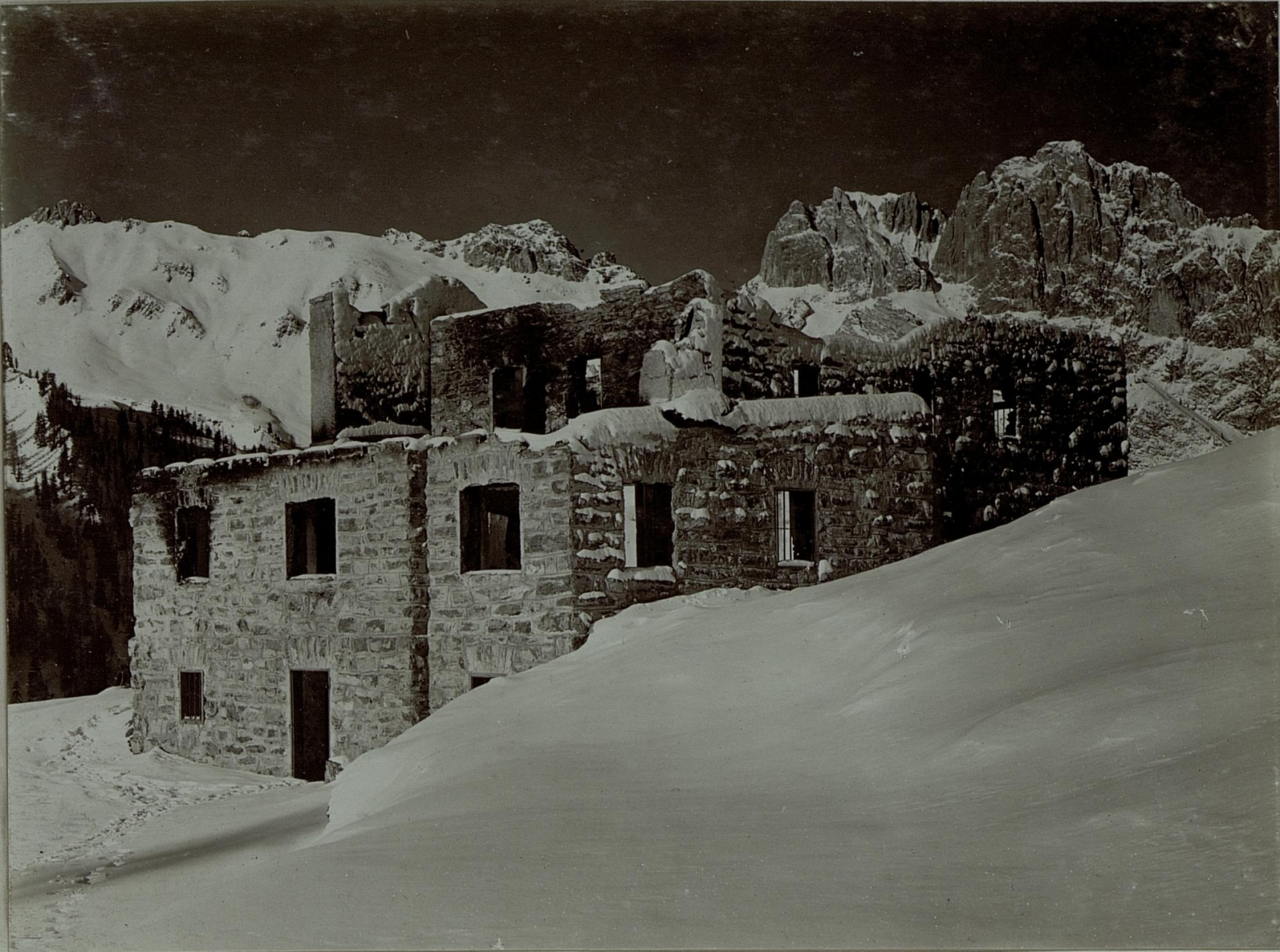 Panorama: Contrinhaus, aufgenommen am 18. November 1915